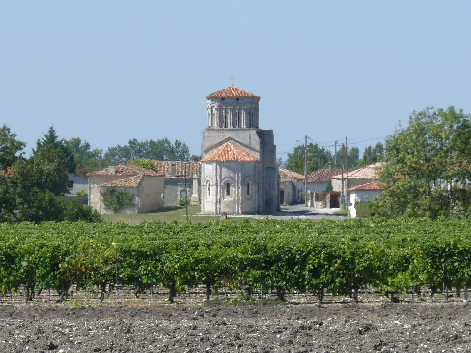 Le bourg et l'église de Moings, Charente-Maritime, France